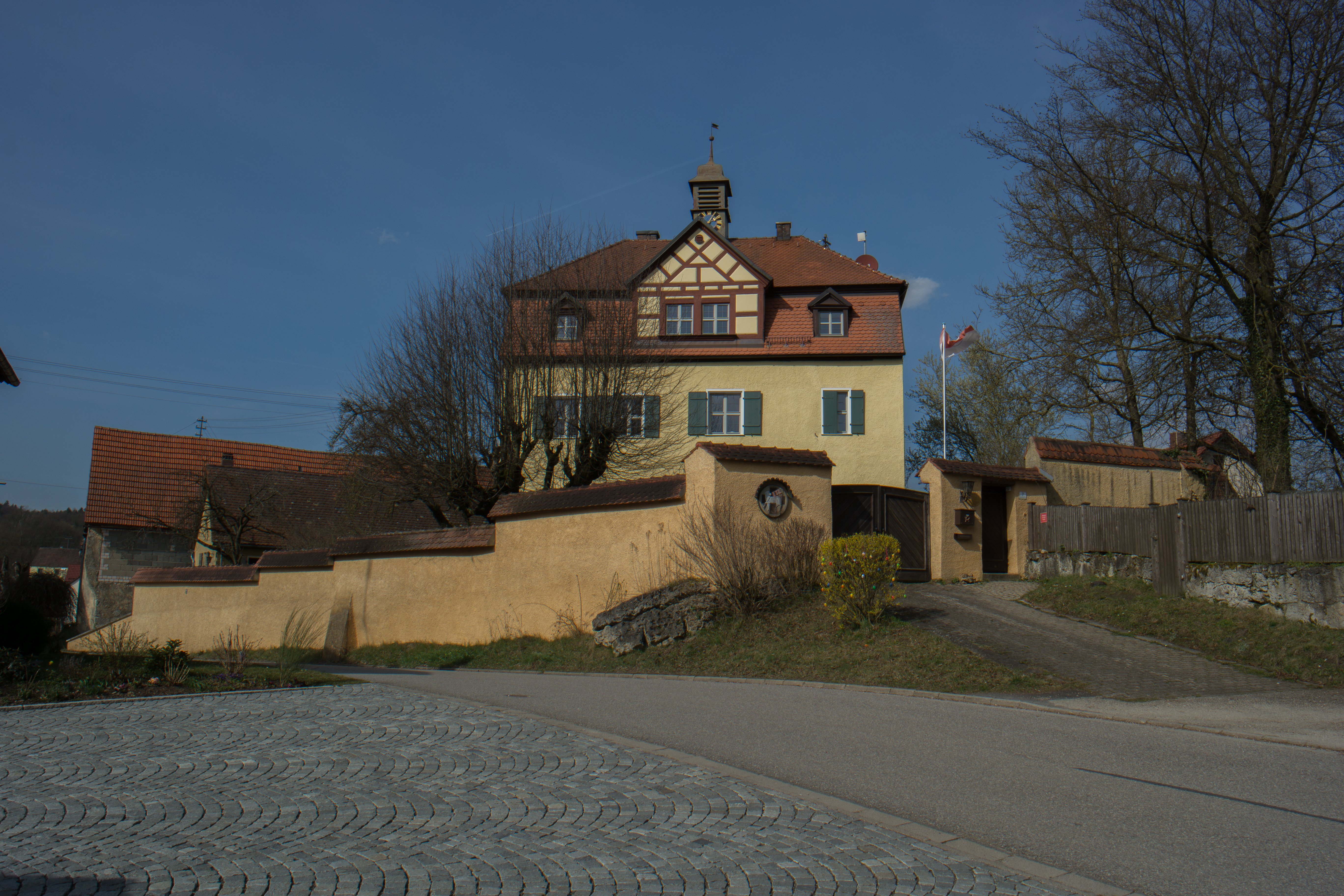 Herrensitz Großengsee, Baudenkmal D-5-74-158-26: Pfarrhaus, ehemaliges Tucher-Schloss, zweigeschossiger Putzbau, Mansarddach mit Schopf, Zwerchhaus, Dachreiter mit geschweifter Kuppel, im Kern 1630-32, Umbau 1672; Nebengebäude, eingeschossiger Satteldachbau, 18. Jahrhundert; Mauer. Bodendenkmal D-5-6334-0047: Mittelalterlicher Burgstall und Herrensitz der frühen Neuzeit